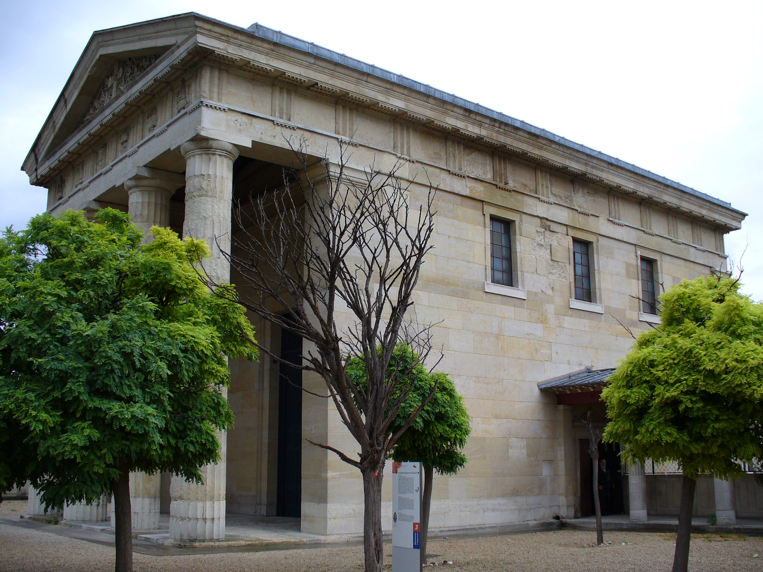 Chapelle de l'hôpital Esquirol. Saint-Maurice (Val-de-Marne, France).